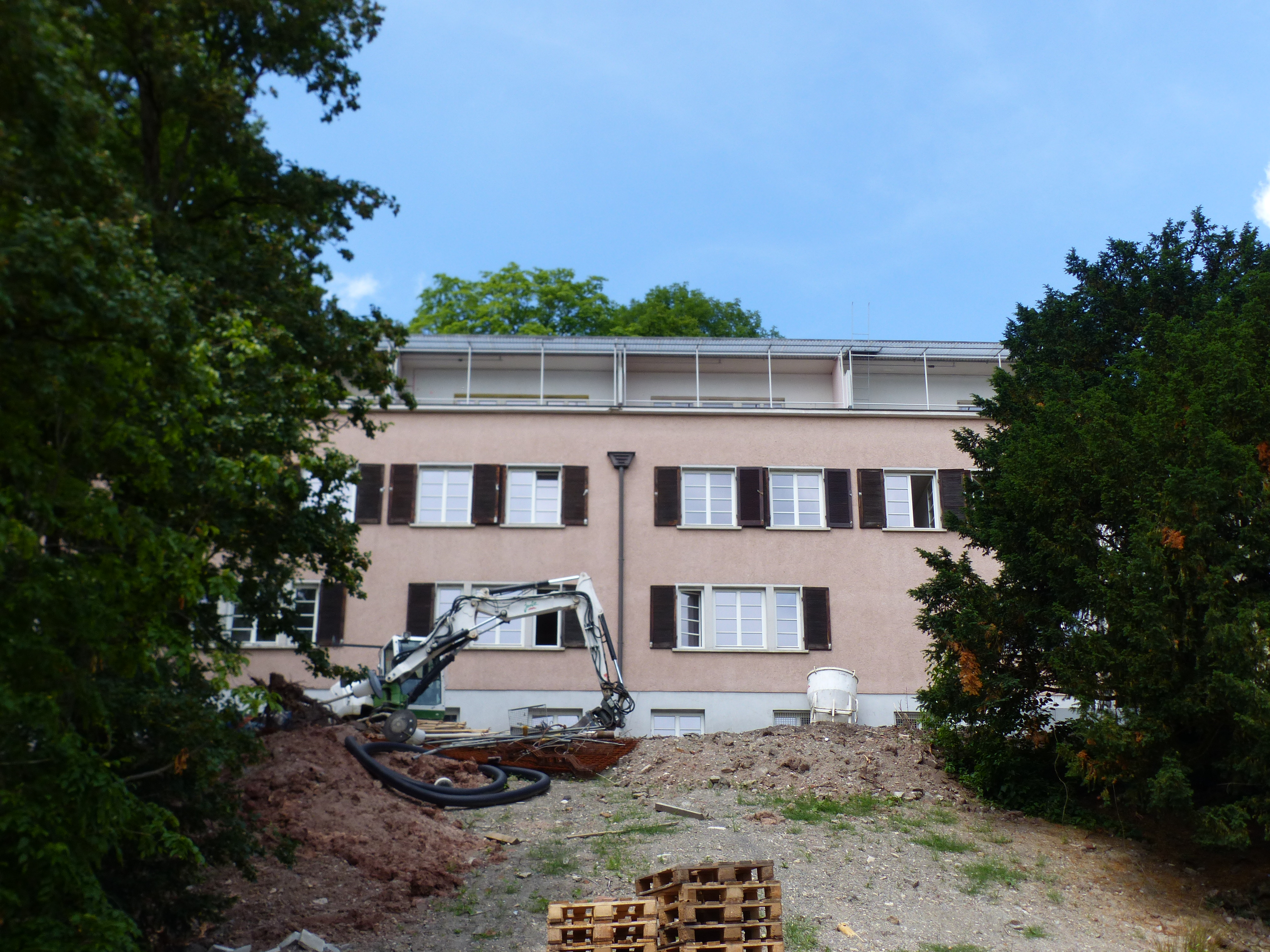 Reihenhaus, Sandweg 2, 4, 6, 8, 10, 12, Stadtteil: Südheim, Stadtbezirk: Süd, Stadt: Stuttgart, Land: Deutschland